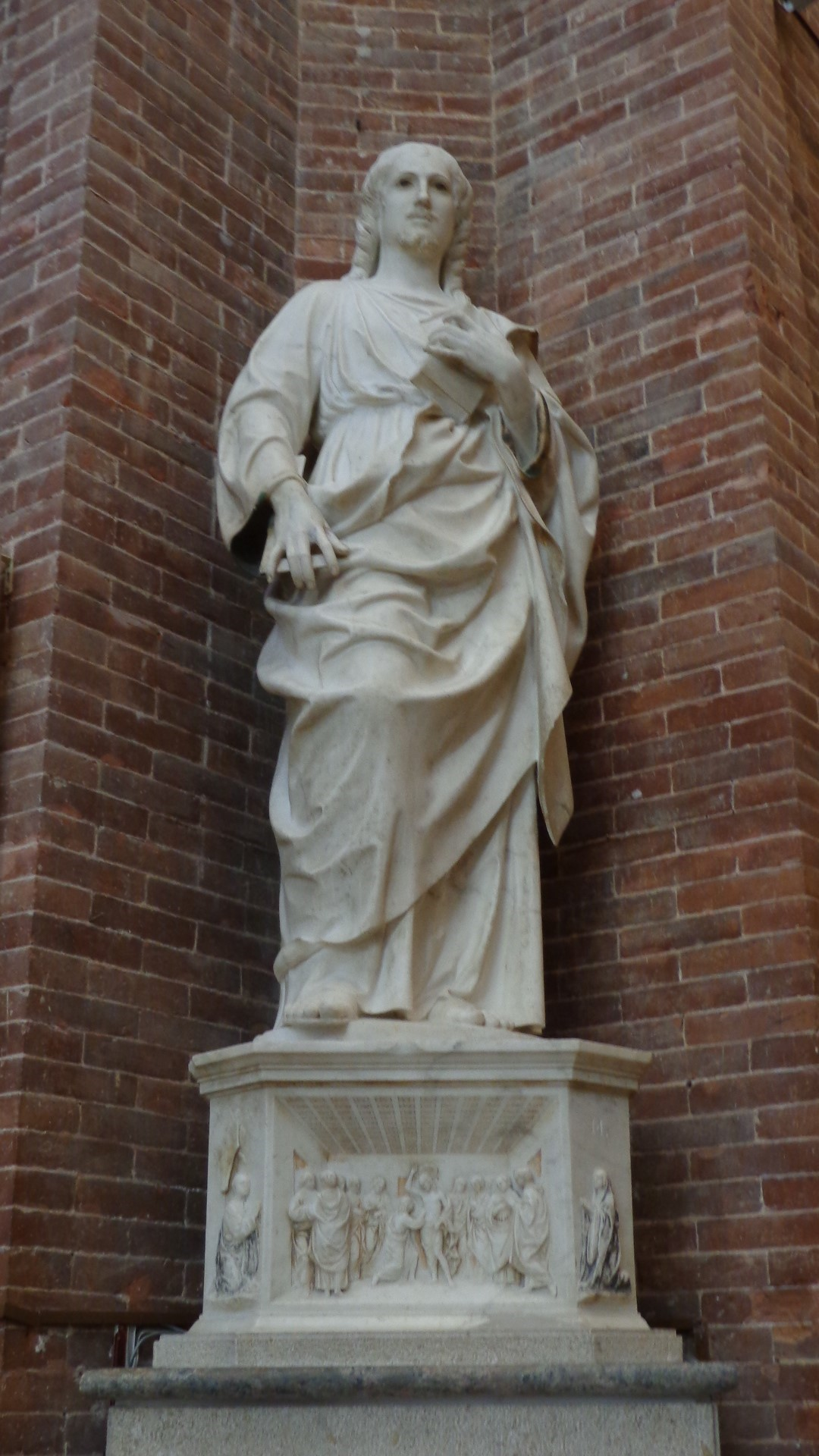 Scultura arco trionfale